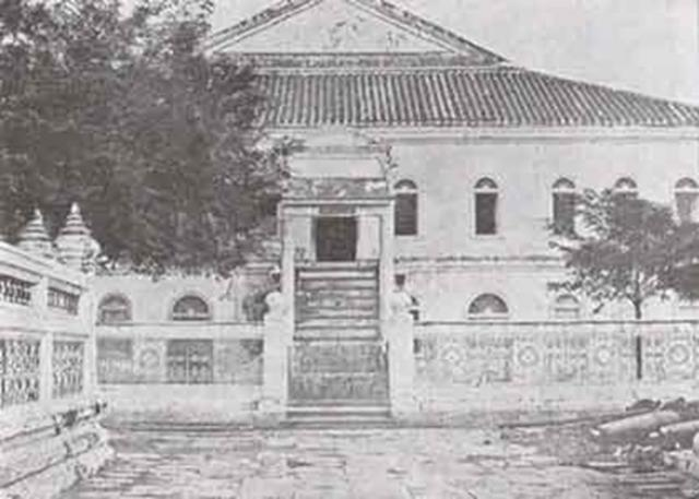 โรงกระสาปน์สิทธิการ